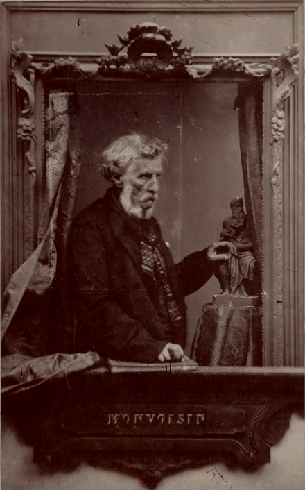 Monvoisin fotografiado por Adolphe Dallemagne